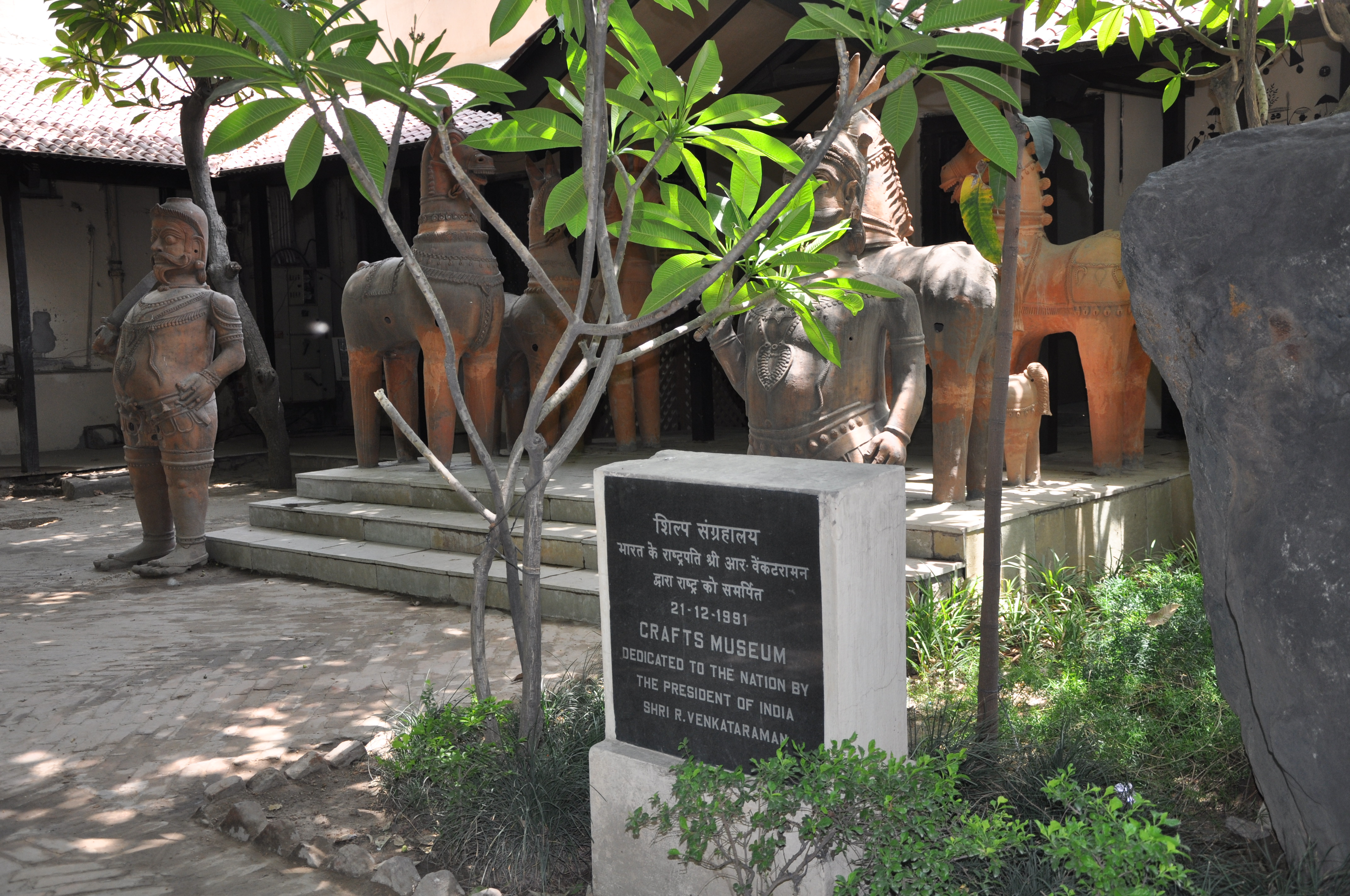 Crafts Museum, New Delhi